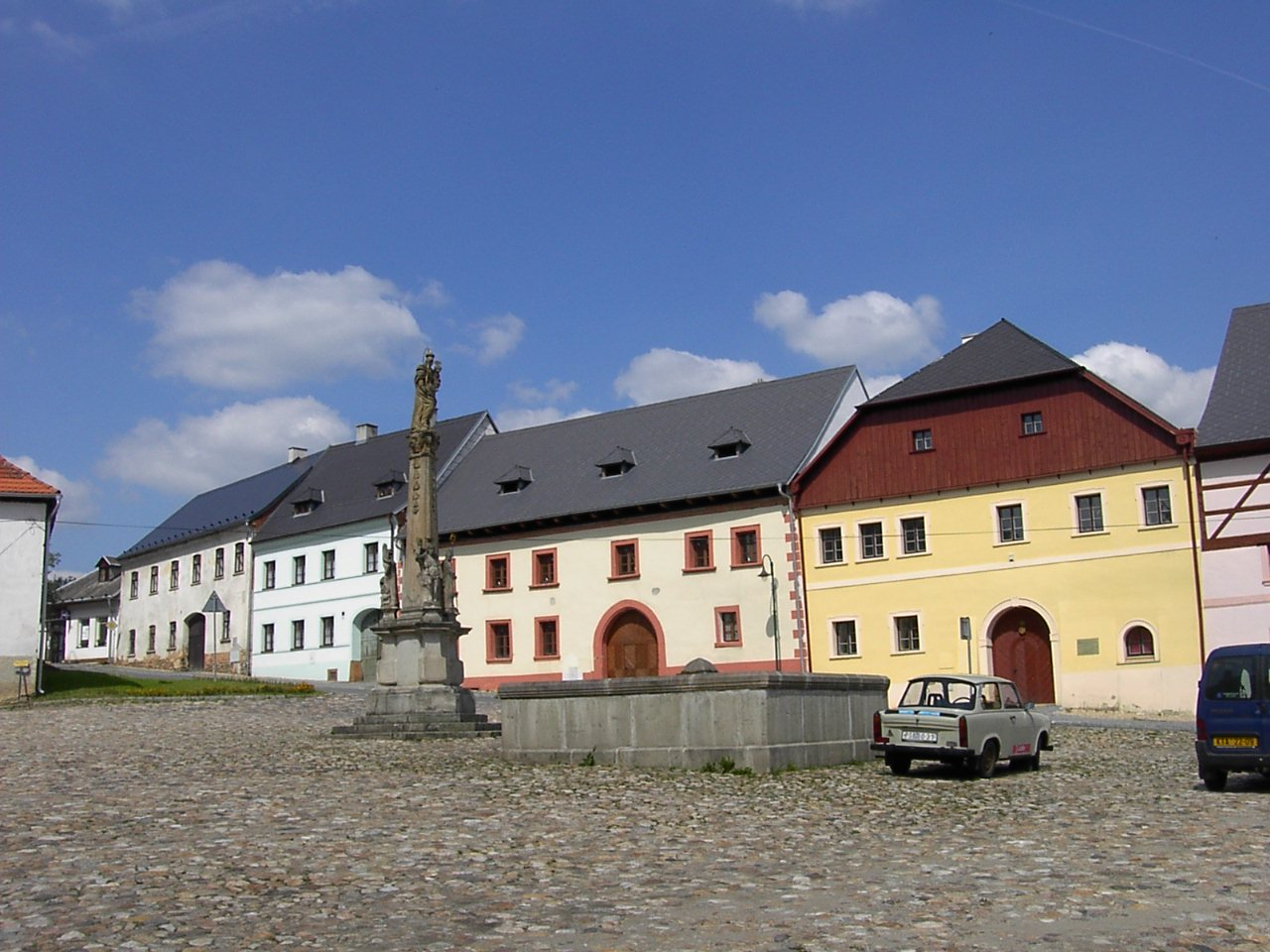 Square in village Utery, Czech Republic. Domy na úterské "návsi" s Mariánským sloupem.